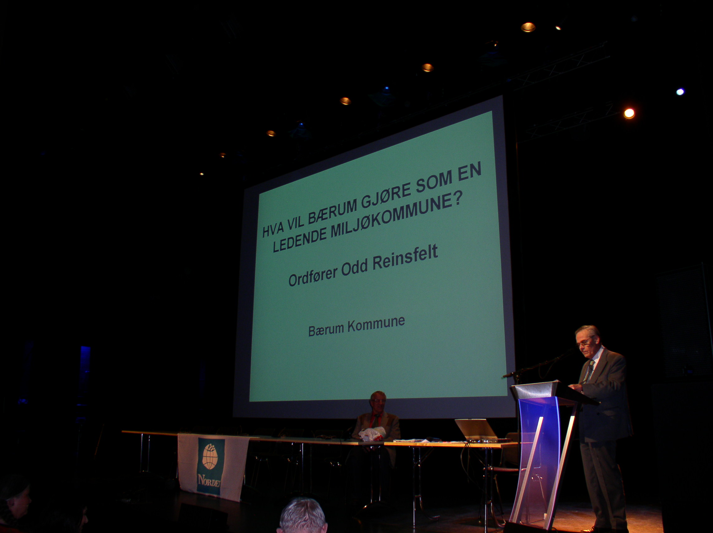 Odd Reinsfelt lover miljøtiltak i Bærum. Bildet er tatt på en konferanse i Bærum Kulturhus som var arrangert av miljøorganisasjonen Grønn Hverdag.